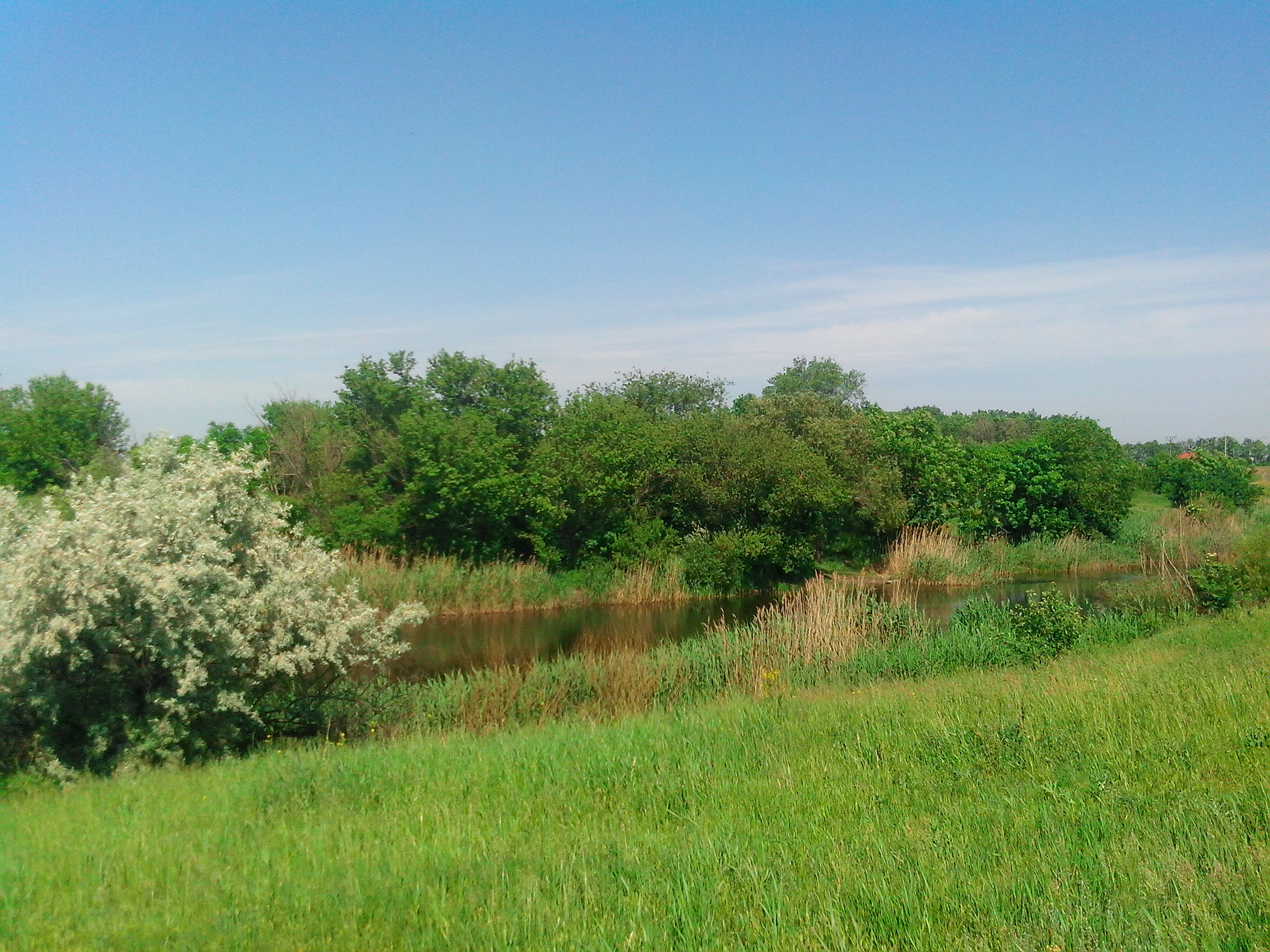 Бакаї, Васильківський р-н, смт Васильківка, с. Вовчанське